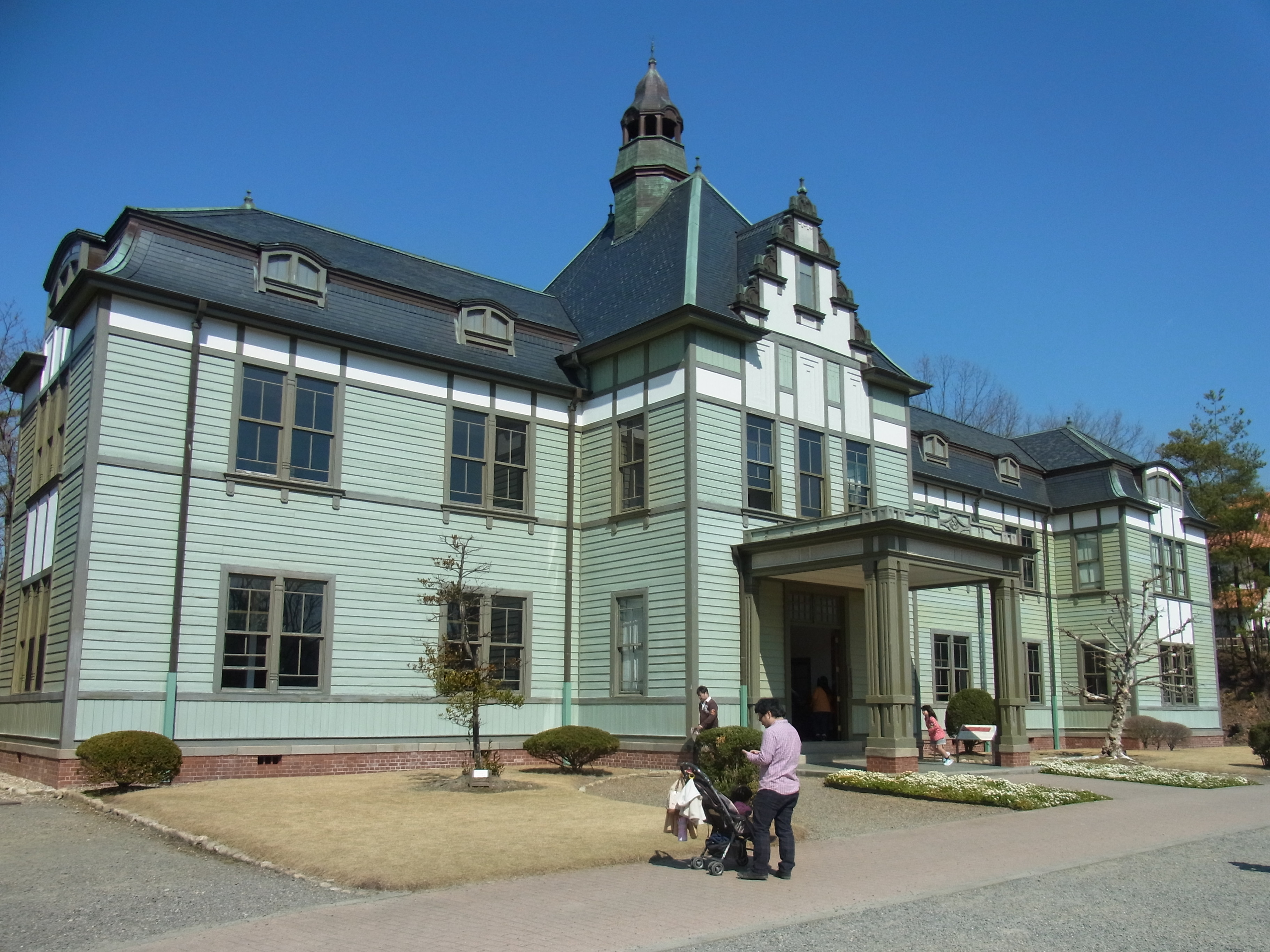 明治村、北里研究所本館・医学館